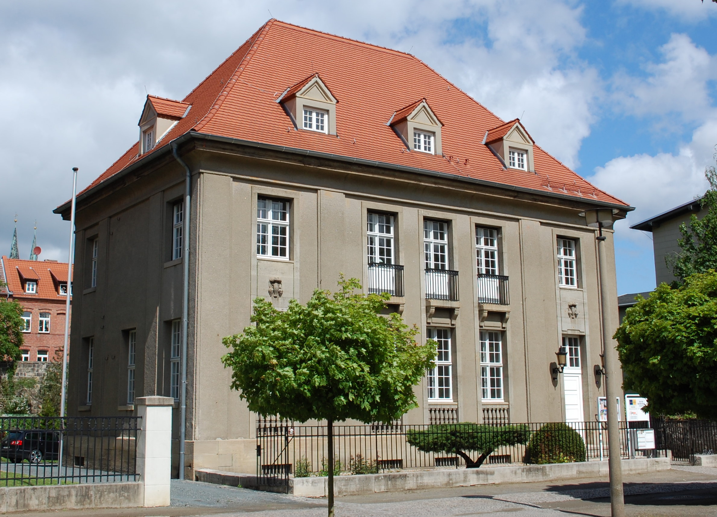 ehemalige Reichsbank-Nebenstelle Quedlinburg, Adelheidstraße 3 in Quedlinburg; erbaut 1911-1913; heute als Bürogebäude genutzt